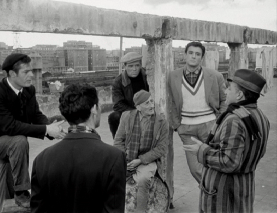 Screenshot dal film I soliti ignoti Licensing Categoria:Immagini di Antonio De Curtis